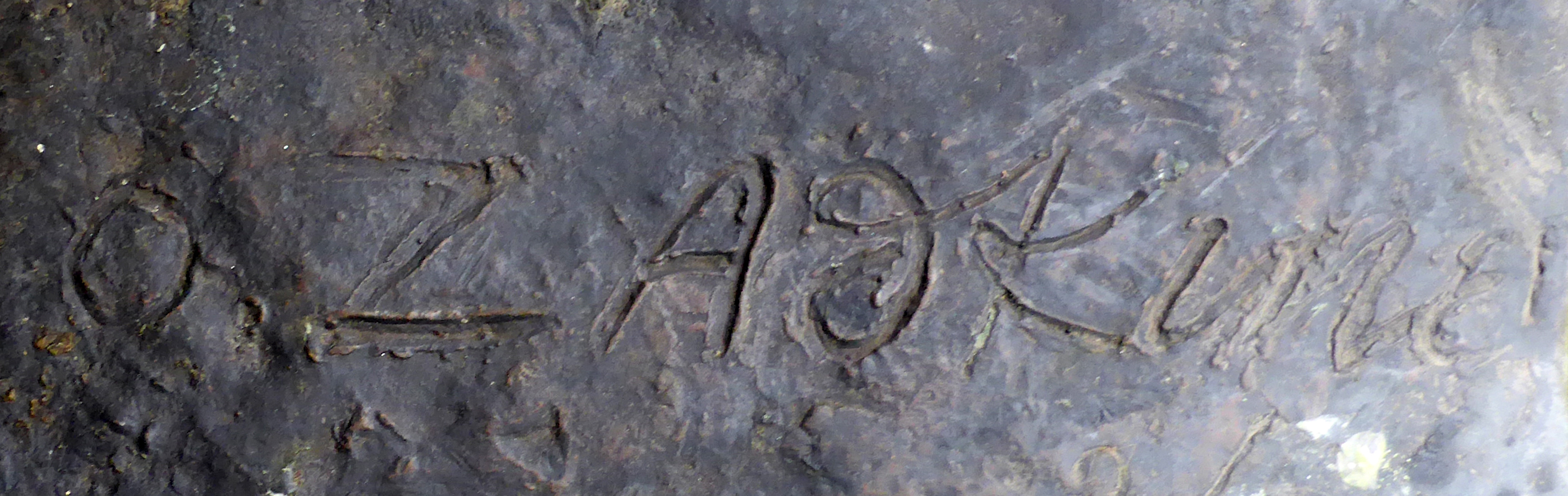 Ossip Zadkine Skulptur (Bronze) von 1943. Abguss von 1958 auf dem Westfriedhof (Köln). Inschrift: "cire perdue – dik grosman – velp Holland".